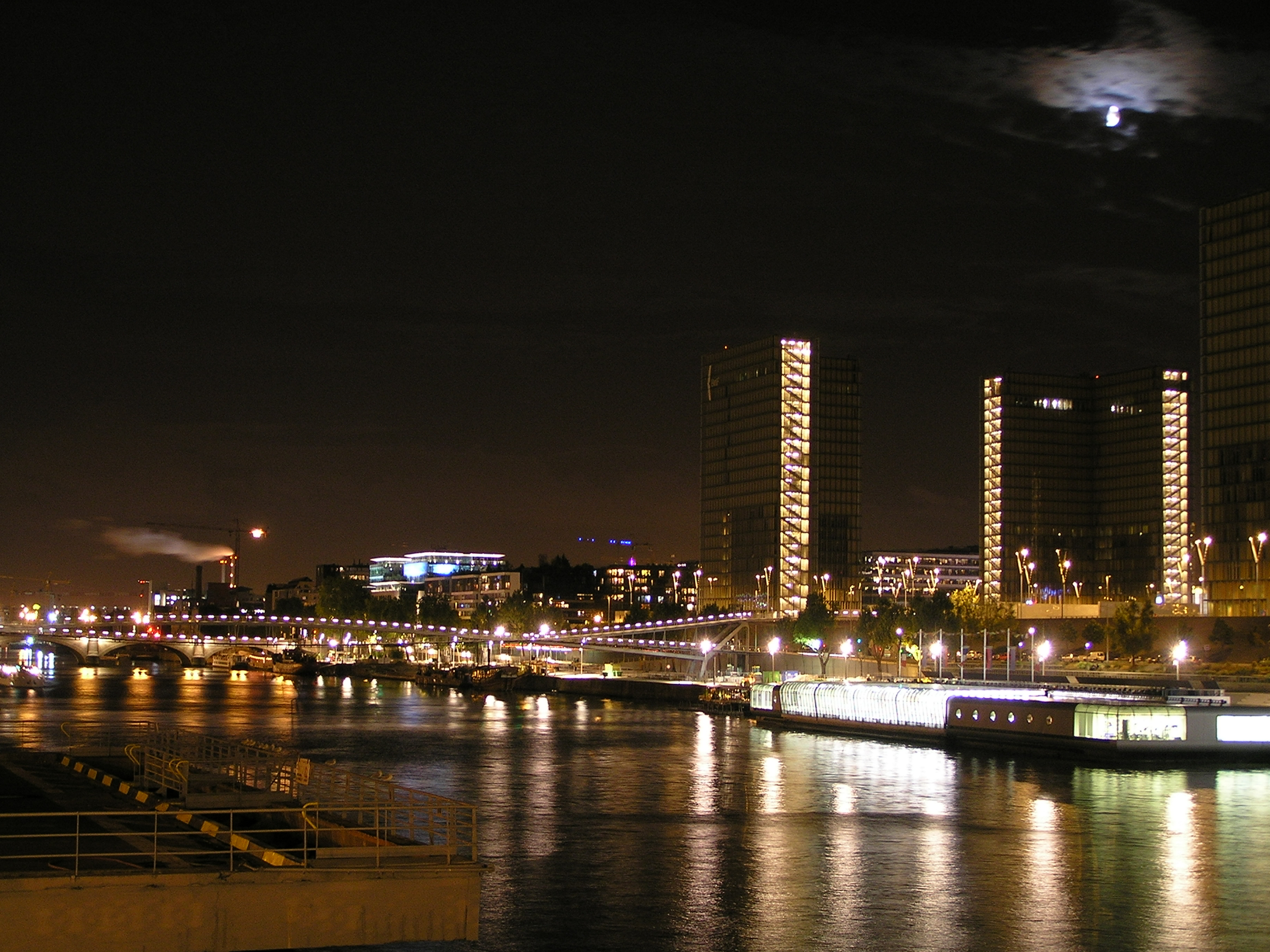 Bibliothèque nationale de France.